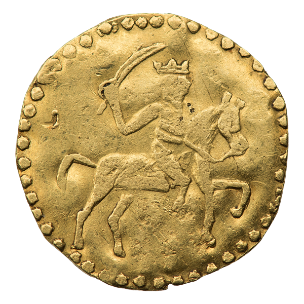 Деньга 1613—1645 гг., без даты. Царь Михаил Федорович Романов. Новодел. Биткин II К49 (R2). Аверс. Всадник на коне, в трехчастном венце, вправо; с занесённой над головой саблей в правой руке.